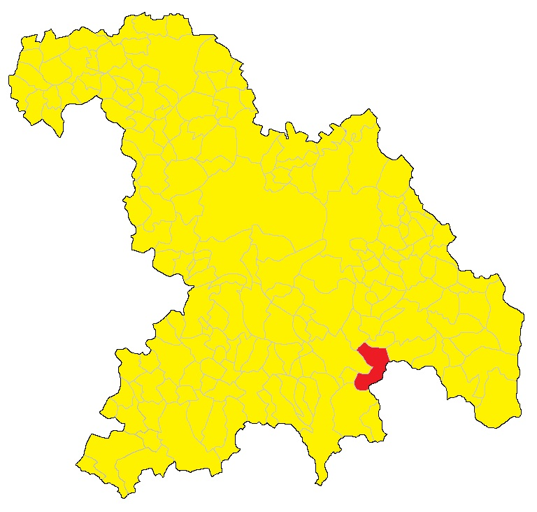 Mappa di Arquata Scrivia (AL).